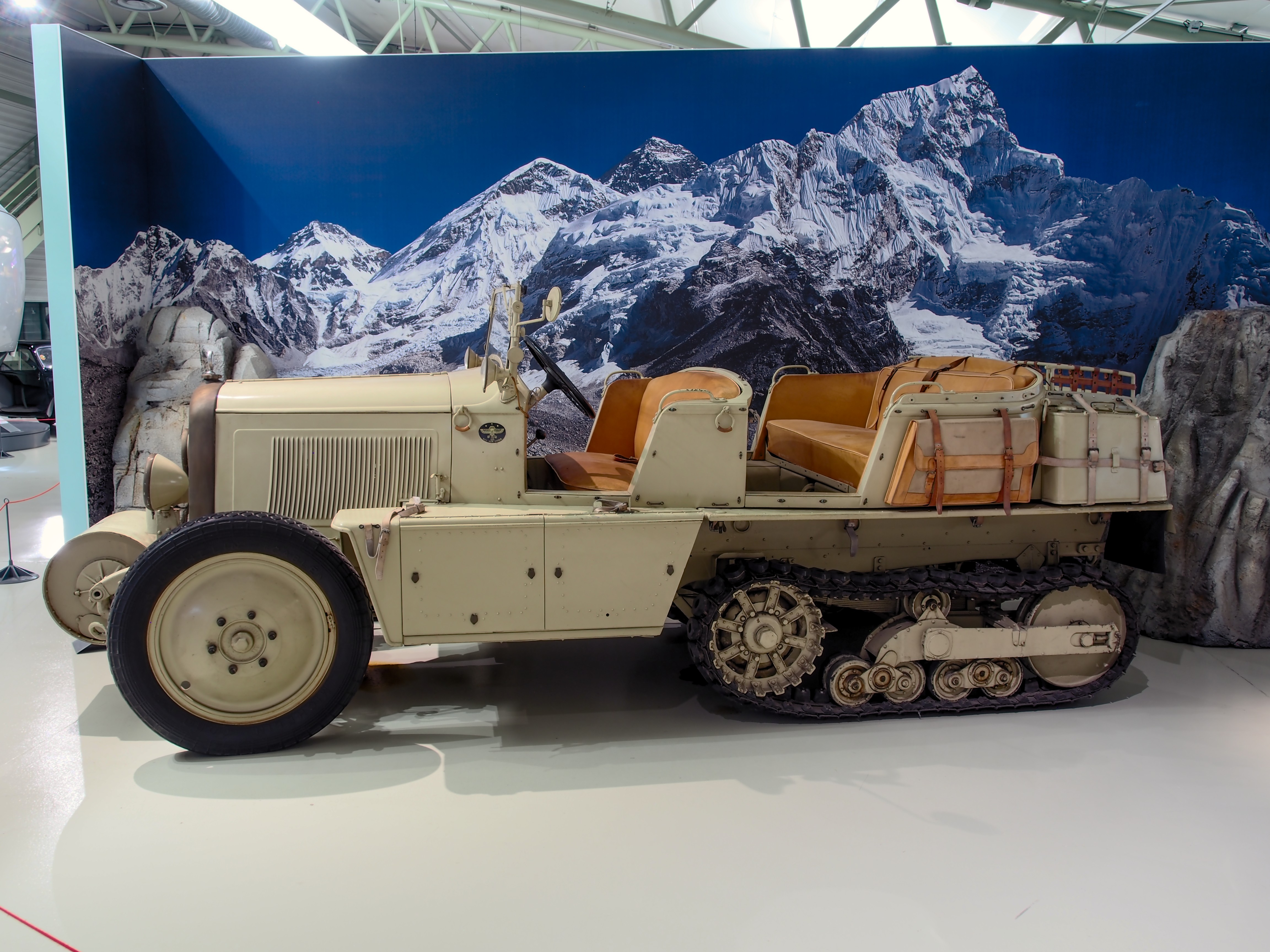 Photographed at Musée des 24 Heures du Mans, France.